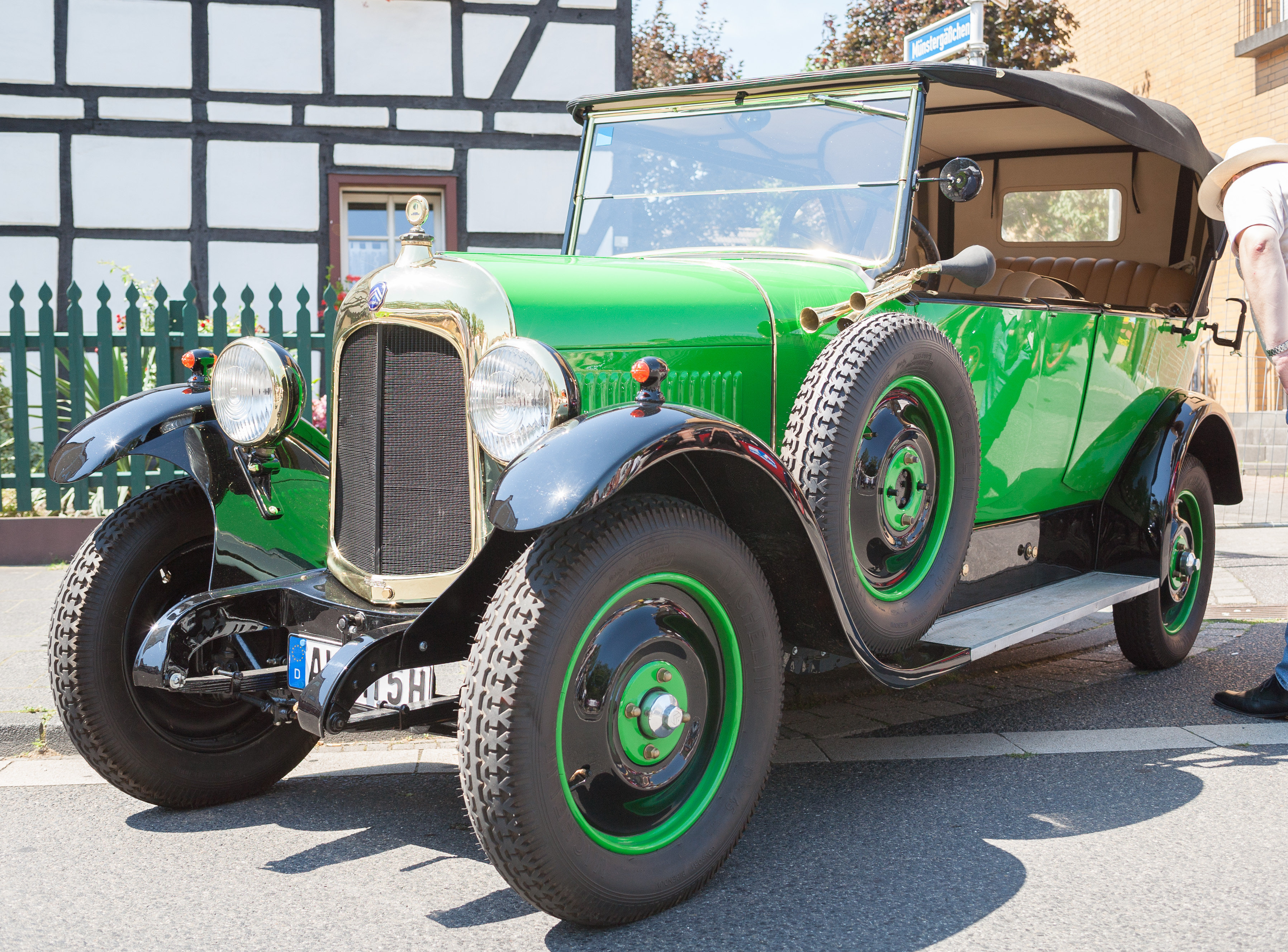 Rheinbach Classics 2007 – Citroën Typ A